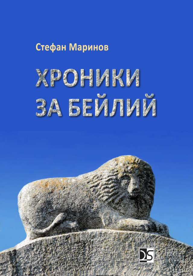 Хроники Бейлий